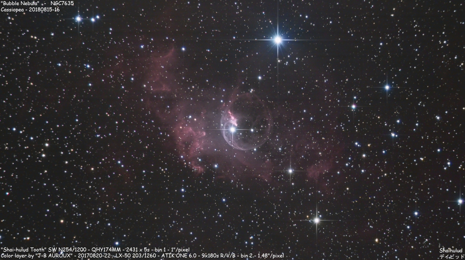 "Bubble Nebula" NGC7635